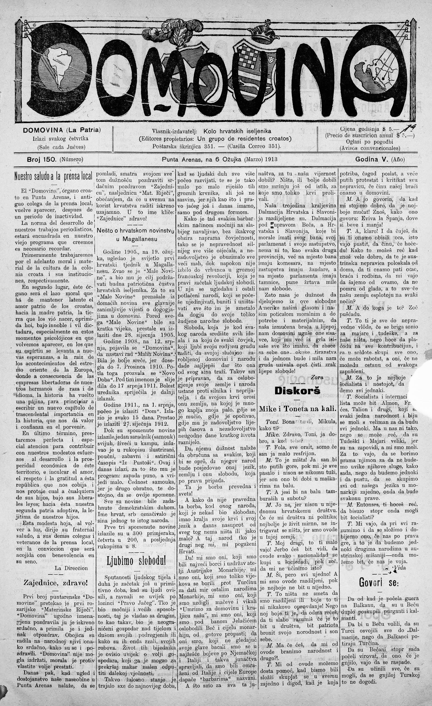 Portada del periódico chileno Domovina del 6 de marzo de 1913